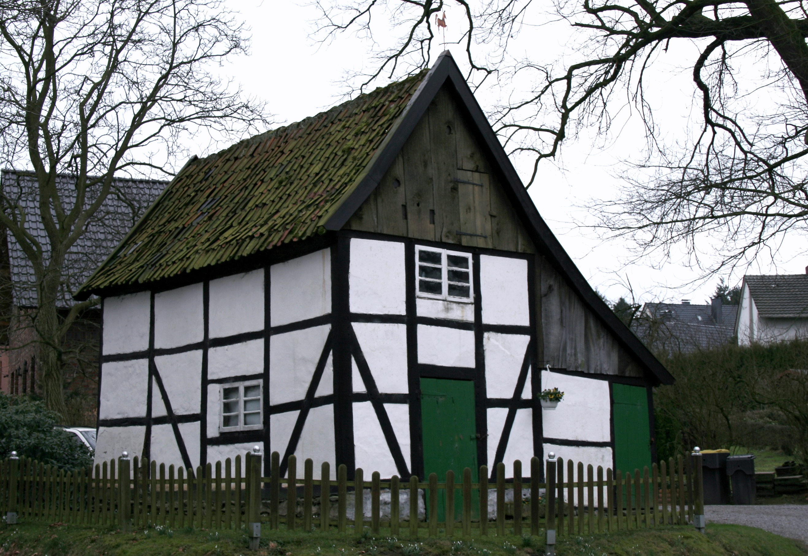 Kotten (ehemaliger Spieker mit Kübbung), Dunkler Weg 5 im Ortsteil Schwitten der Stadt Menden (Sauerland). This image shows a heritage building in Germany, located in the North Rhine-Westphalian city Menden (Sauerland) (no. 50).